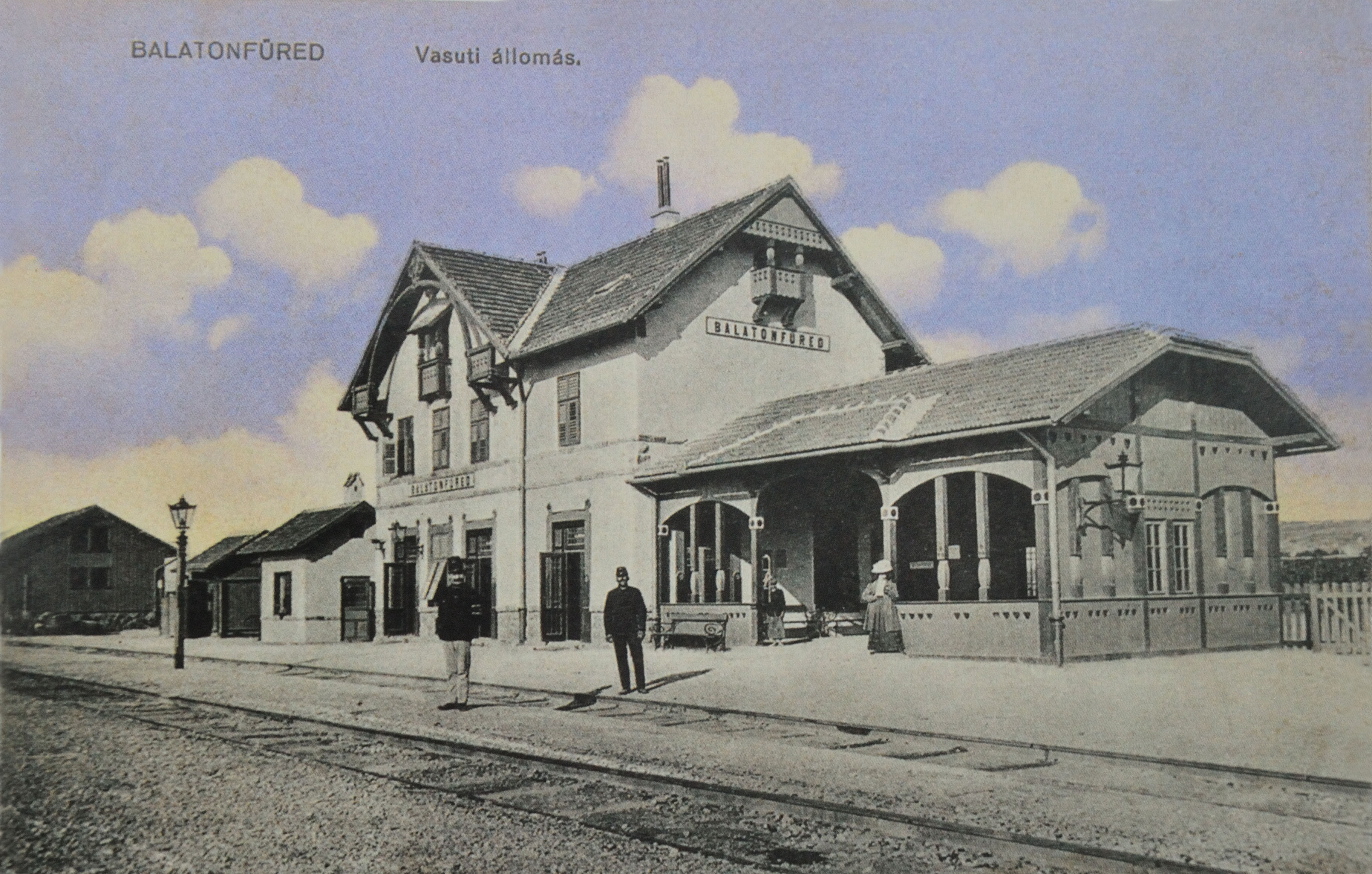 A balatonfüredi vasútállomás 1910 körül képeslapon. Megjegyzés a könyvben a képhez a 330. oldalon: „(Címoldal leragasztva). Posta bélyegzett, 1910 körül.”